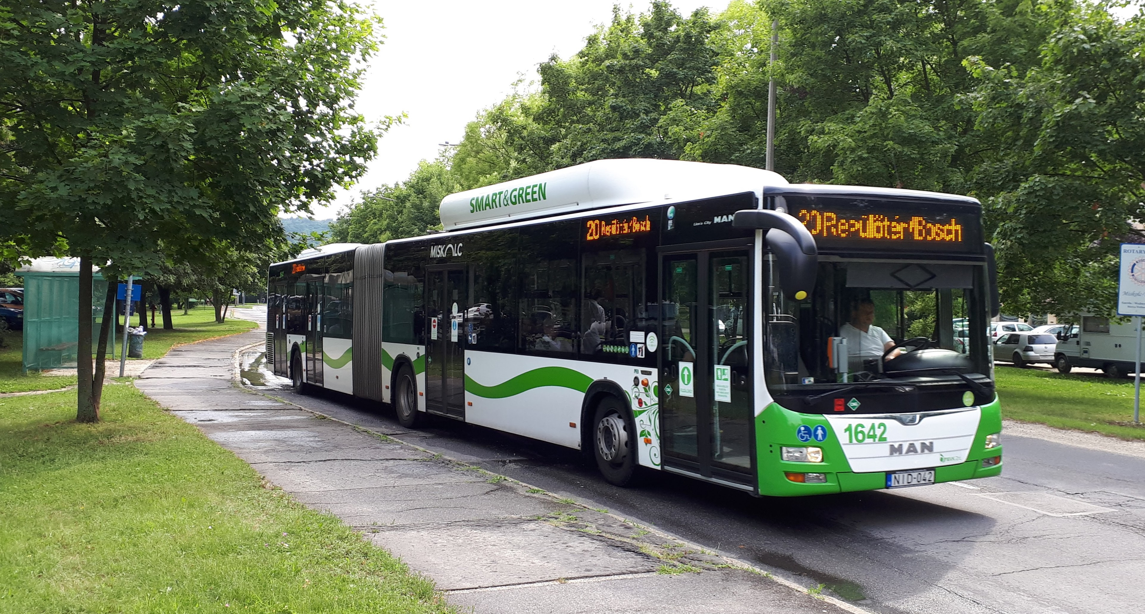 Az MVK MAN Lion's City CNG típusú 20-as járata Miskolctapolca parkoló megállónál